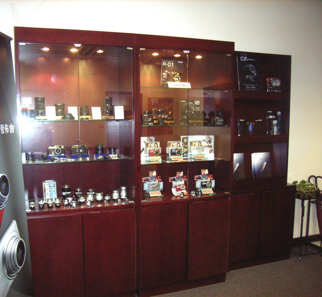 理光數位照相機產品陳列室於譚臣道大同大廈